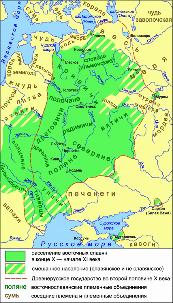 Территория расселения восточных славян в конце X — начале XI века Источник: Александров В. А., Тишков В. А. Начало русской истории (X—XIV века). // Русские. Монография Института этнологии и антропологии РАН. — М.: Наука, 1999. — с. 13